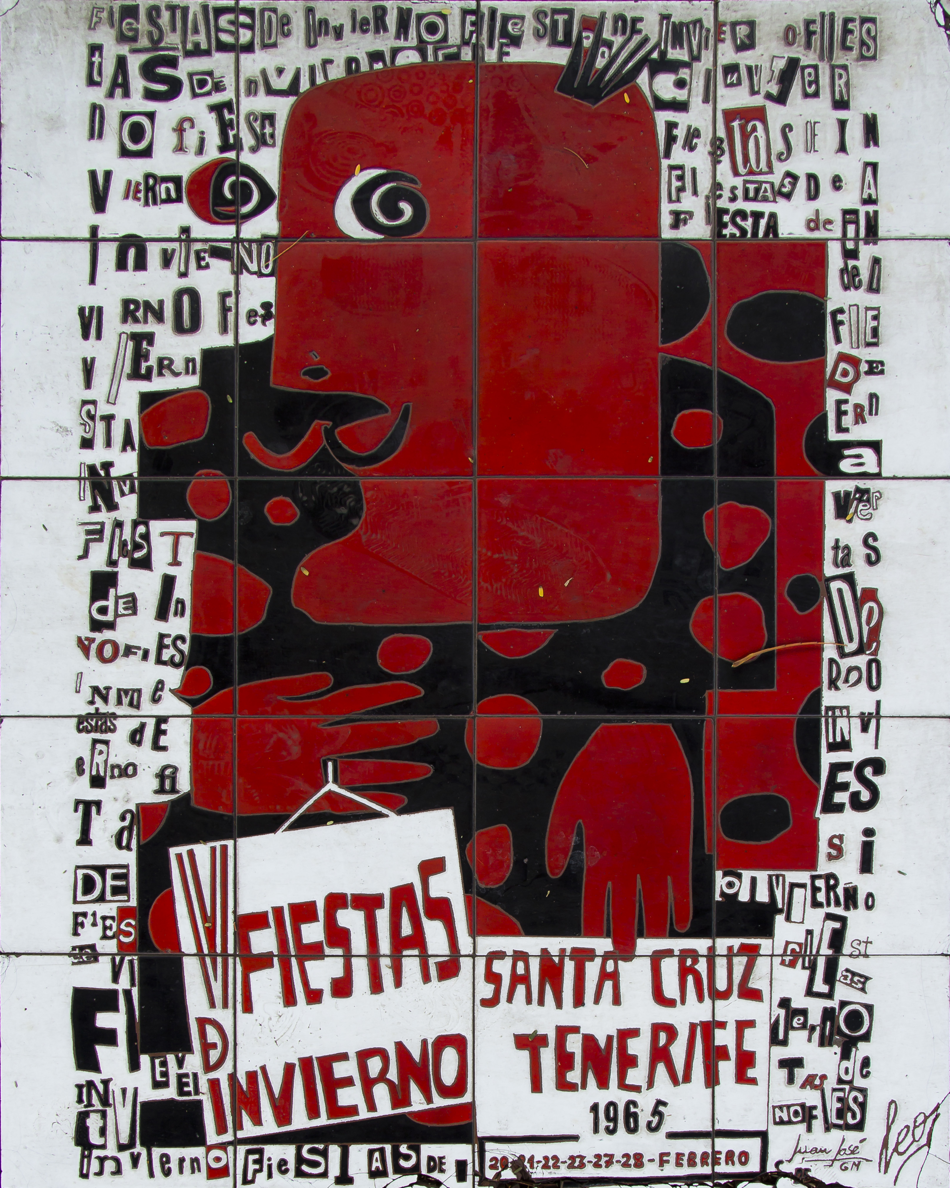 Im Dezember 1996 wurde in Santa Cruz de Tenerife eine Promenade zu Ehren der Gestalter der Karnevalsplakate eröffnet. Dort ist eine große Anzahl der Plakate als „Azulejo“ im Boden eingelassen dargestellt.